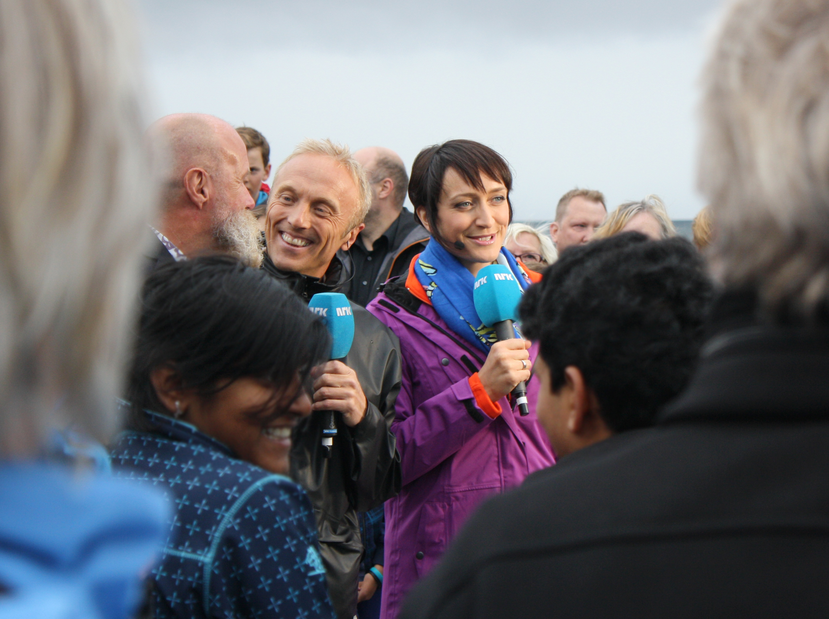 Programleder for NRKs Sommeråpent, Ingerid Stenvold, og reporter for samme program, Magnus Brenna Lund.